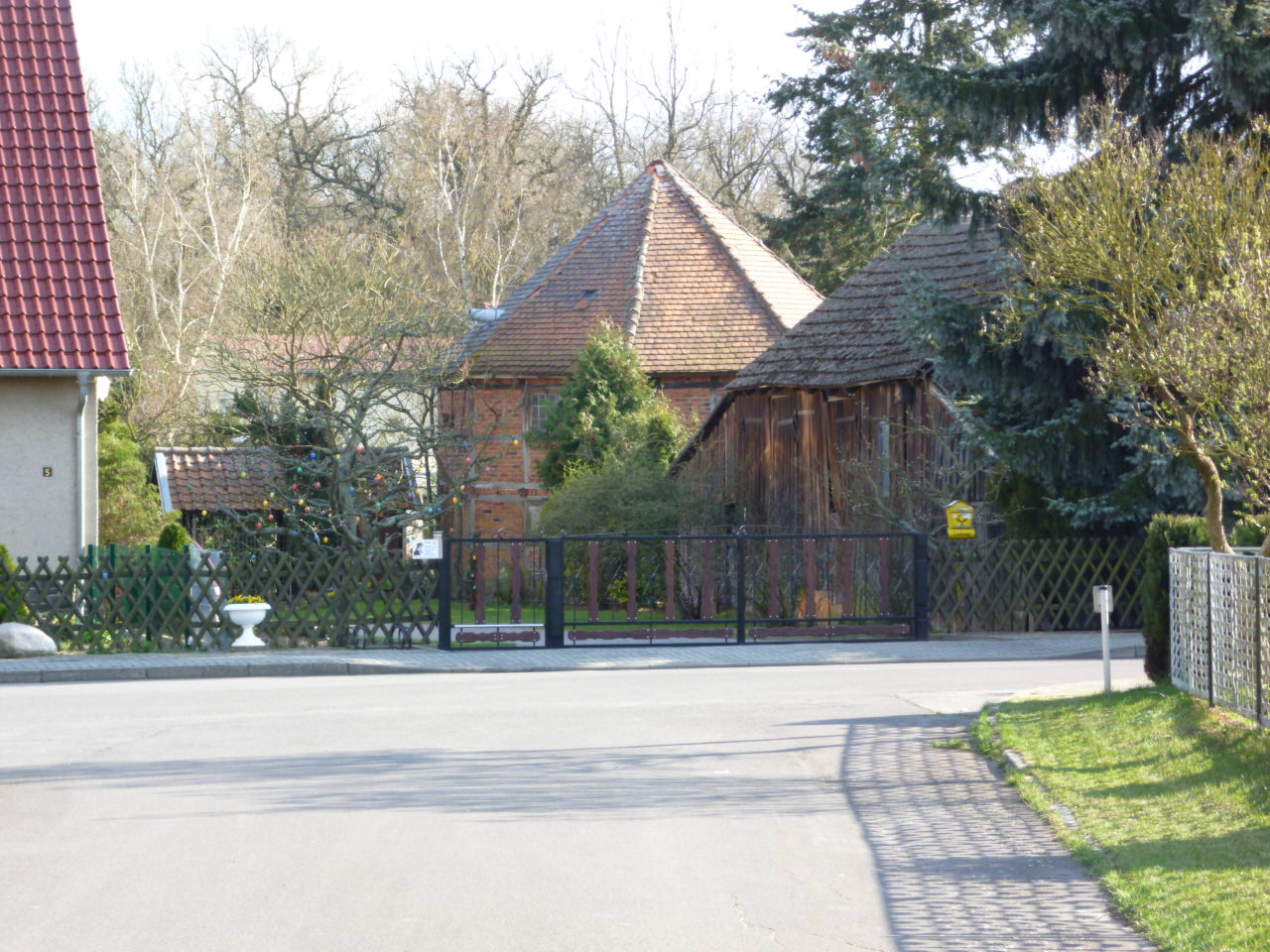 Calvörde-Dorst, Taubenturm auf dem Grundstück der Dorfstrasse 5, 2012